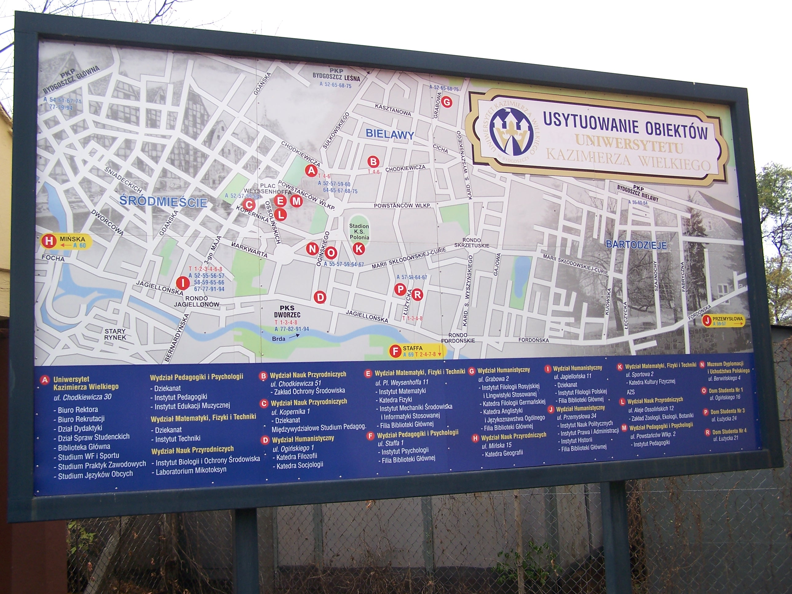 Kazimierz Wielki University in Bydgoszcz, Poland - mapa usytuowania obiektów UKW